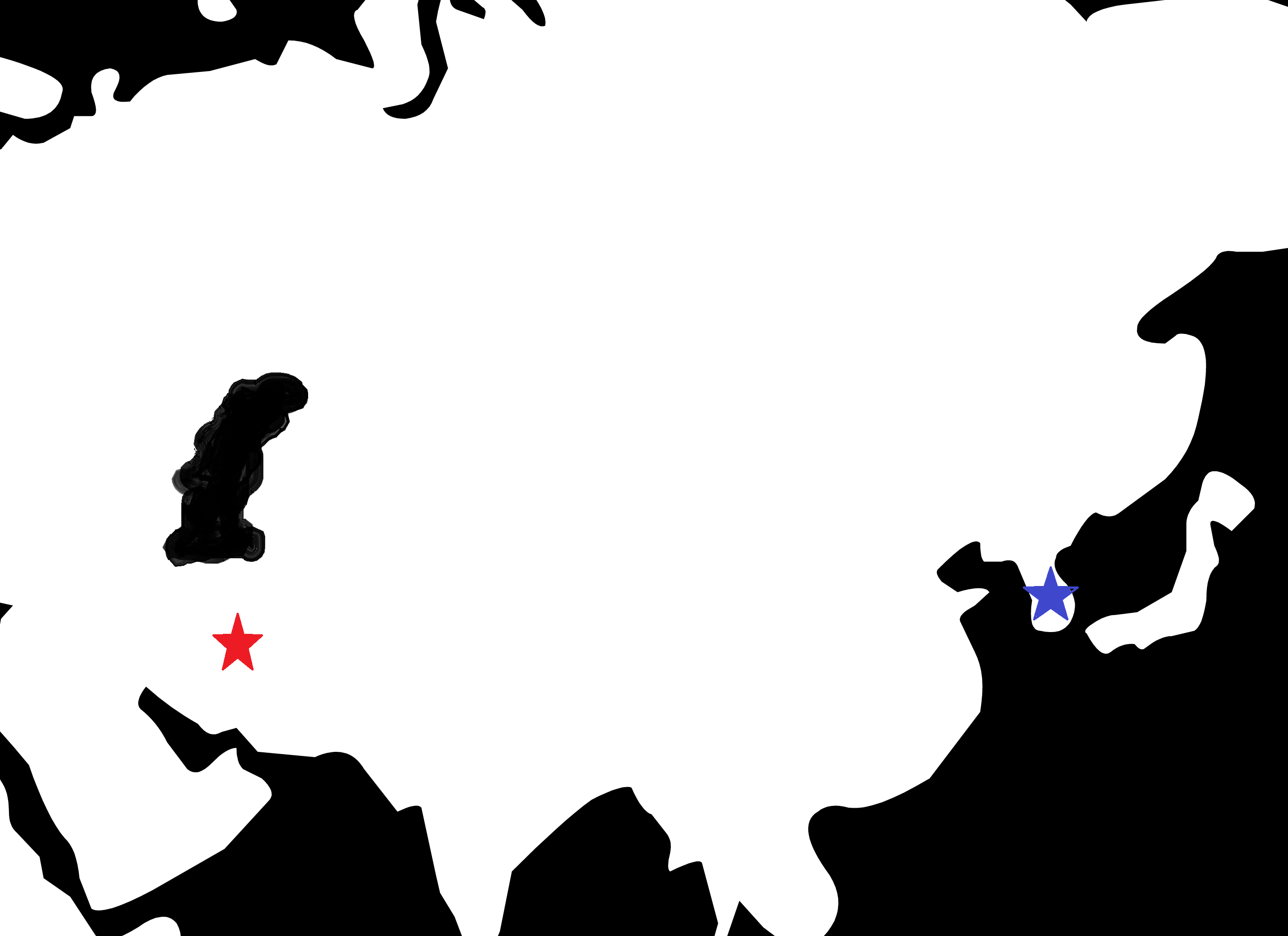 جایگاه ایران و کره جنوبی